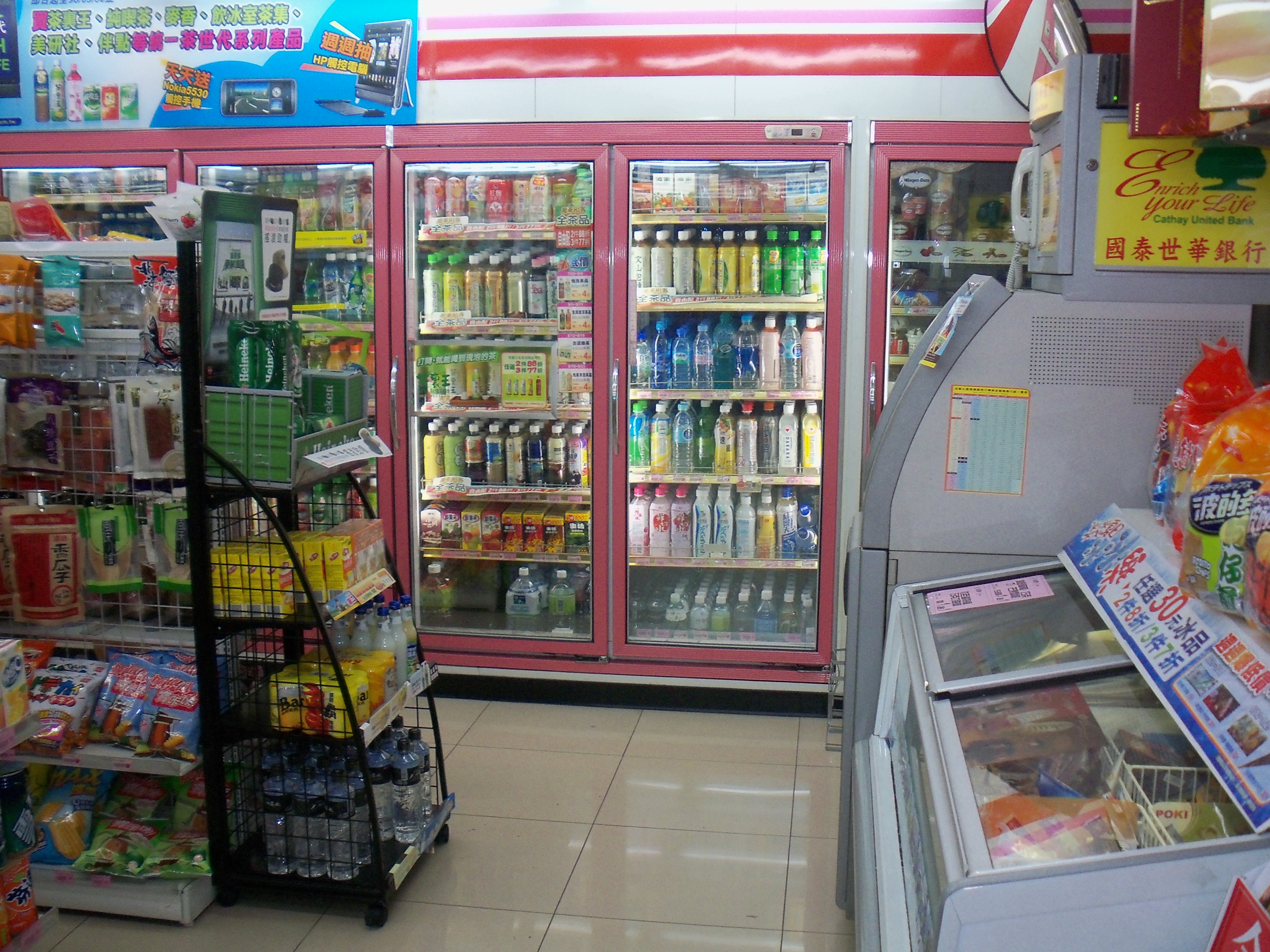 臺北市松山區，萊爾富北市民權二店店內擺設與國泰世華商業銀行自動櫃員機。